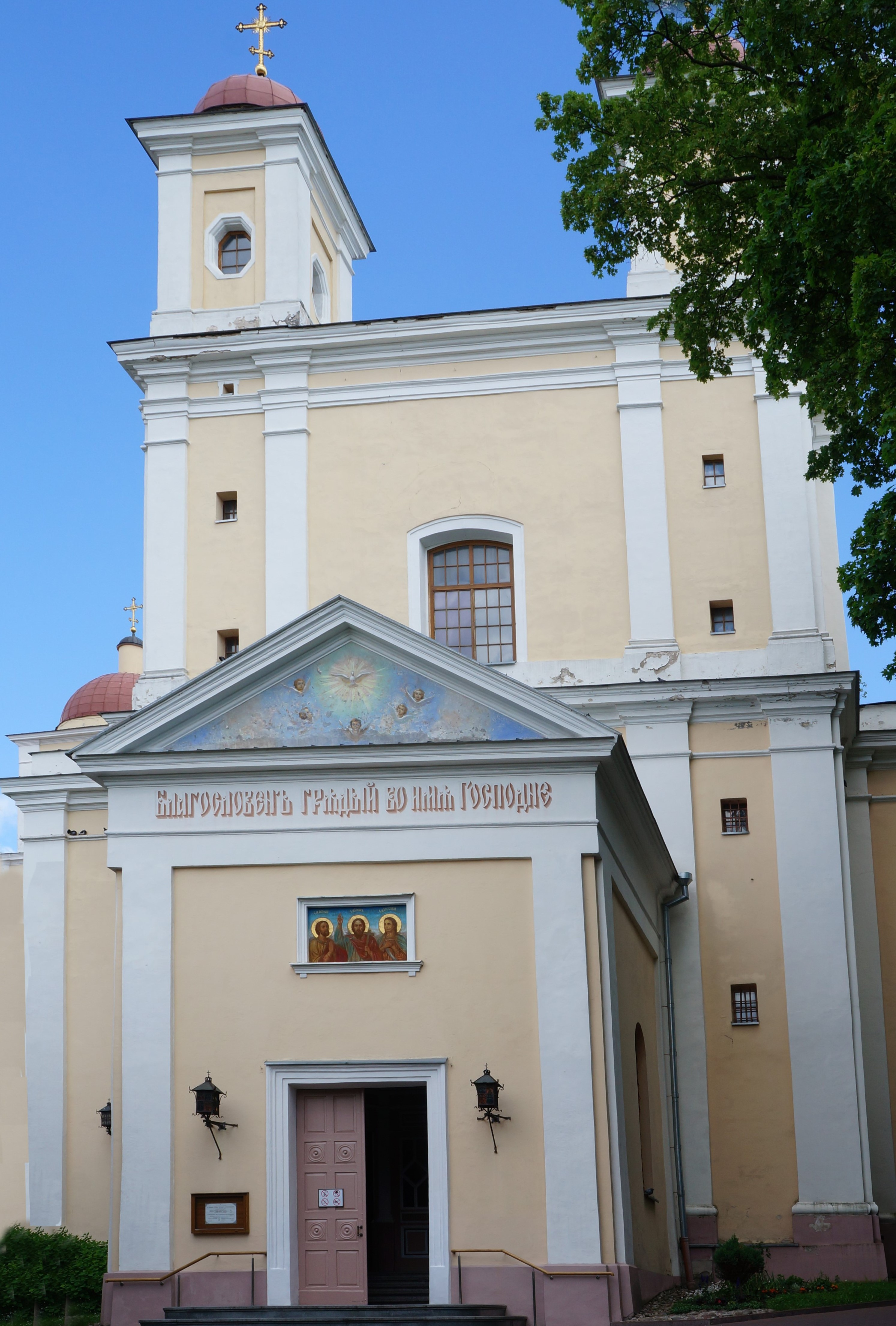 L' Église du Saint-Esprit (Vilnius), Lituanie.